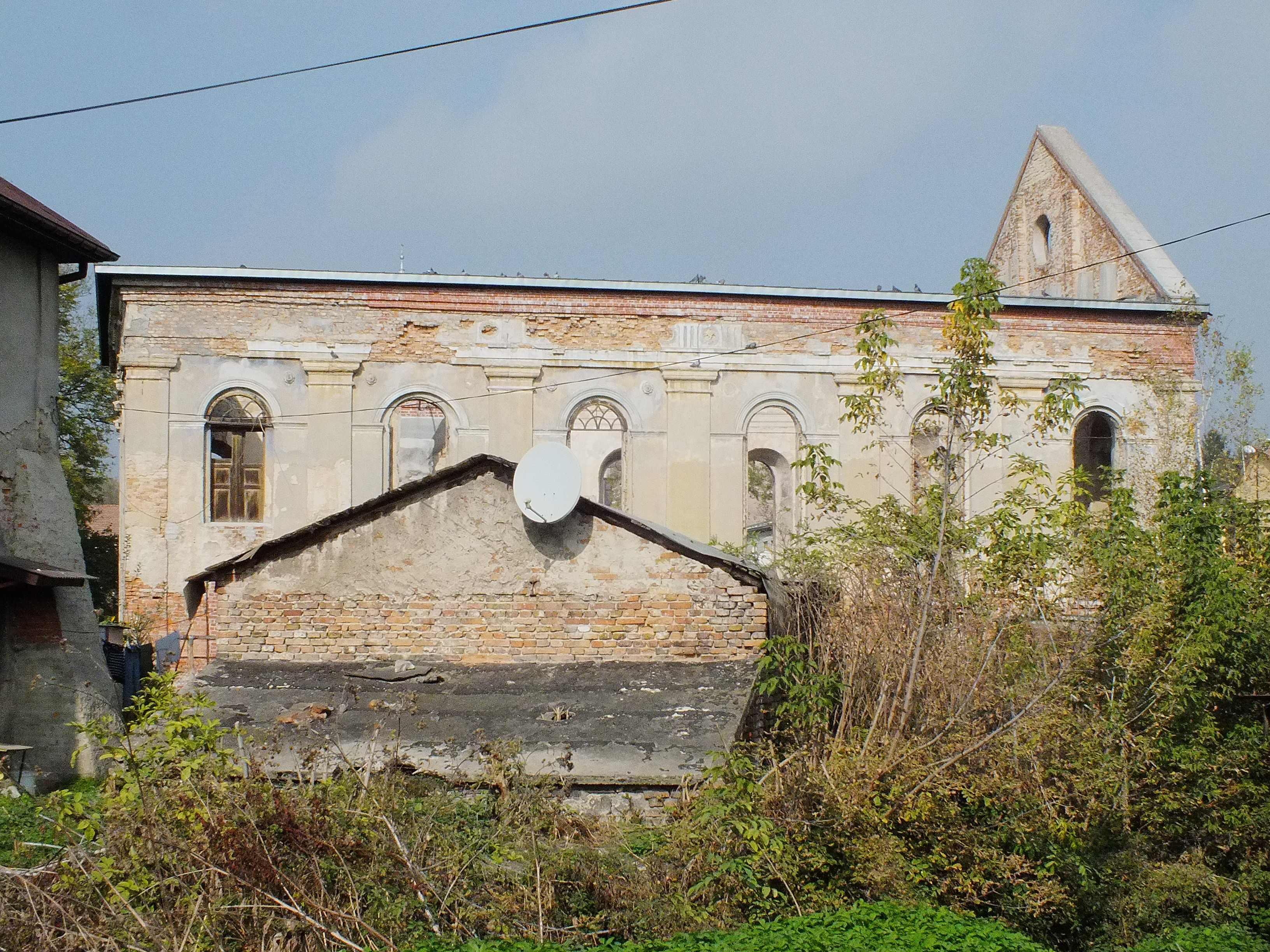 Działoszyce, synagoga, 1852 r.